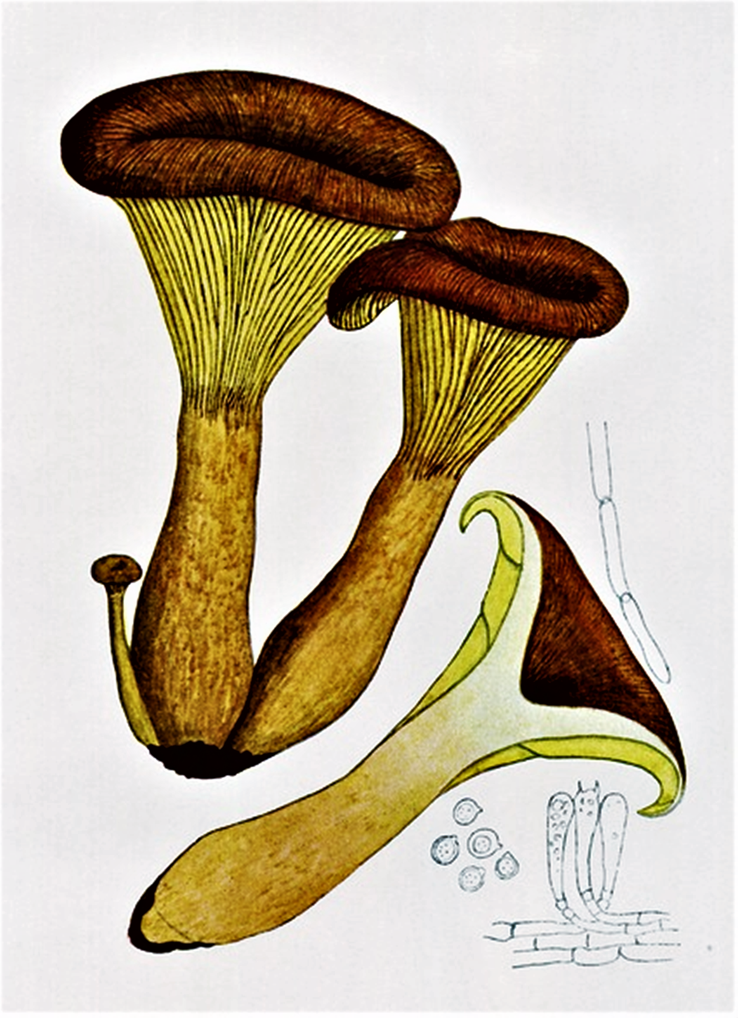 Giacomo Bresadola: Pleurotus olearius (DC.) Gillet (1876), heute Omphalotus olearius (DC.) Singer (1948)